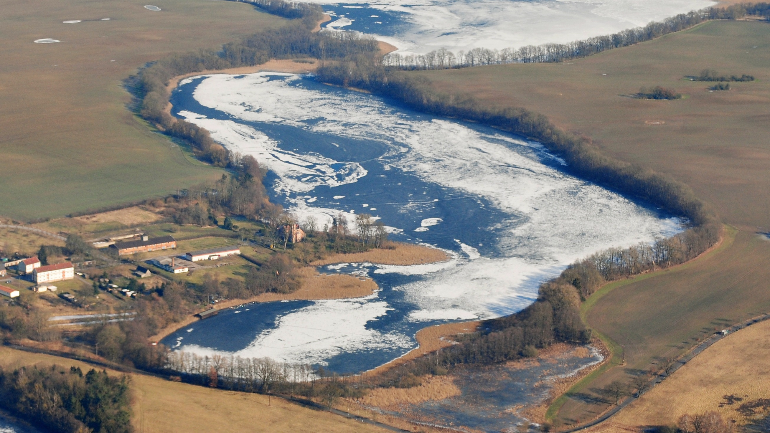 Hofsee aus Richtung S